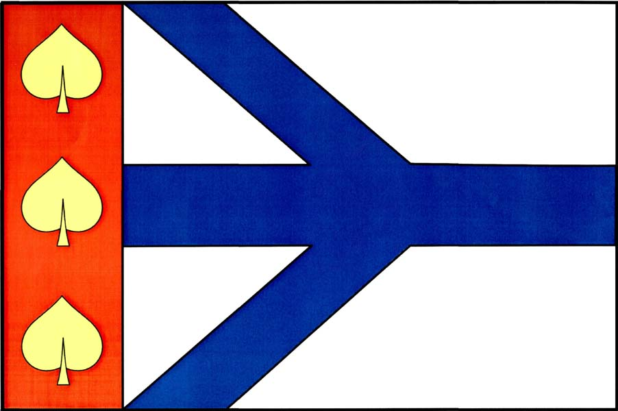 Vlajka obce Rozsochatec